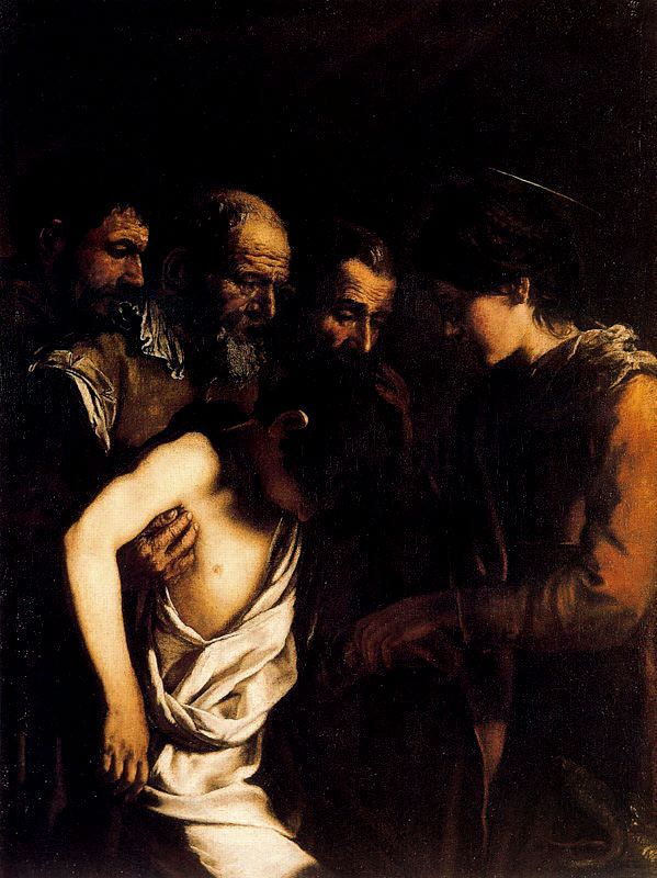 Santa Margarita resucita a un muchachotitle QS:P1476,es:"Santa Margarita resucita a un muchacho" label QS:Les,"Santa Margarita resucita a un muchacho"